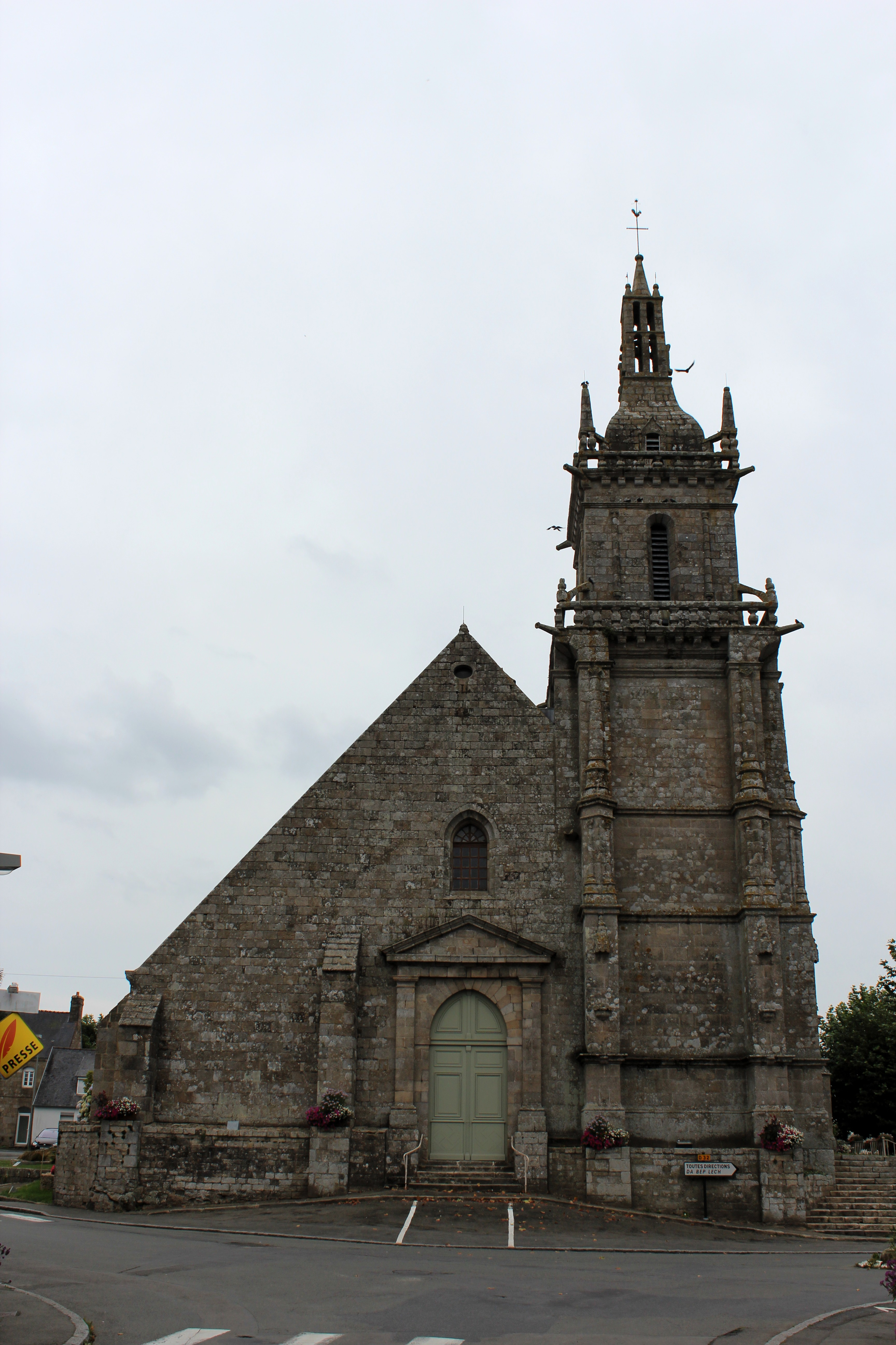 Église Notre-Dame de Plouaret en Côtes-d'Armor. .